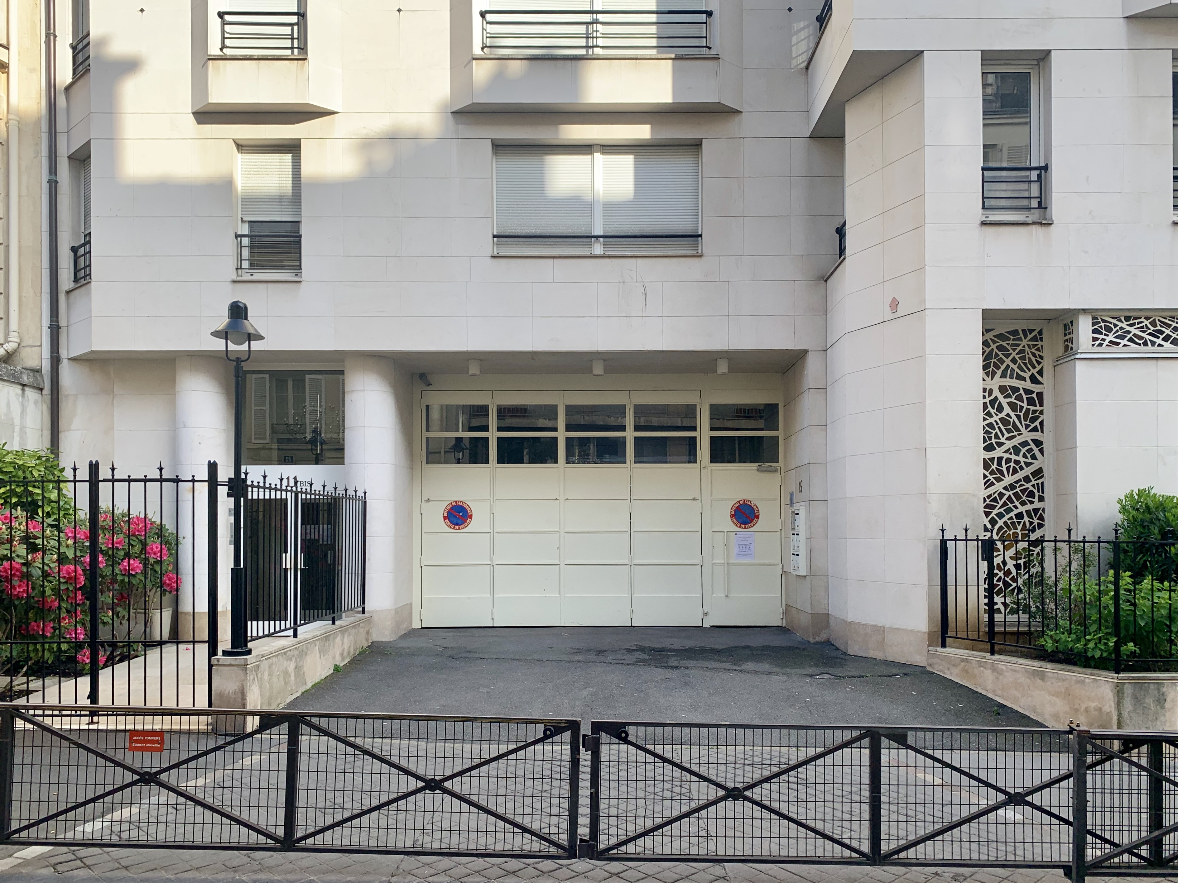 Entrée du « petit collège », école primaire du lycée Saint-Louis-de-Gonzague à Paris.